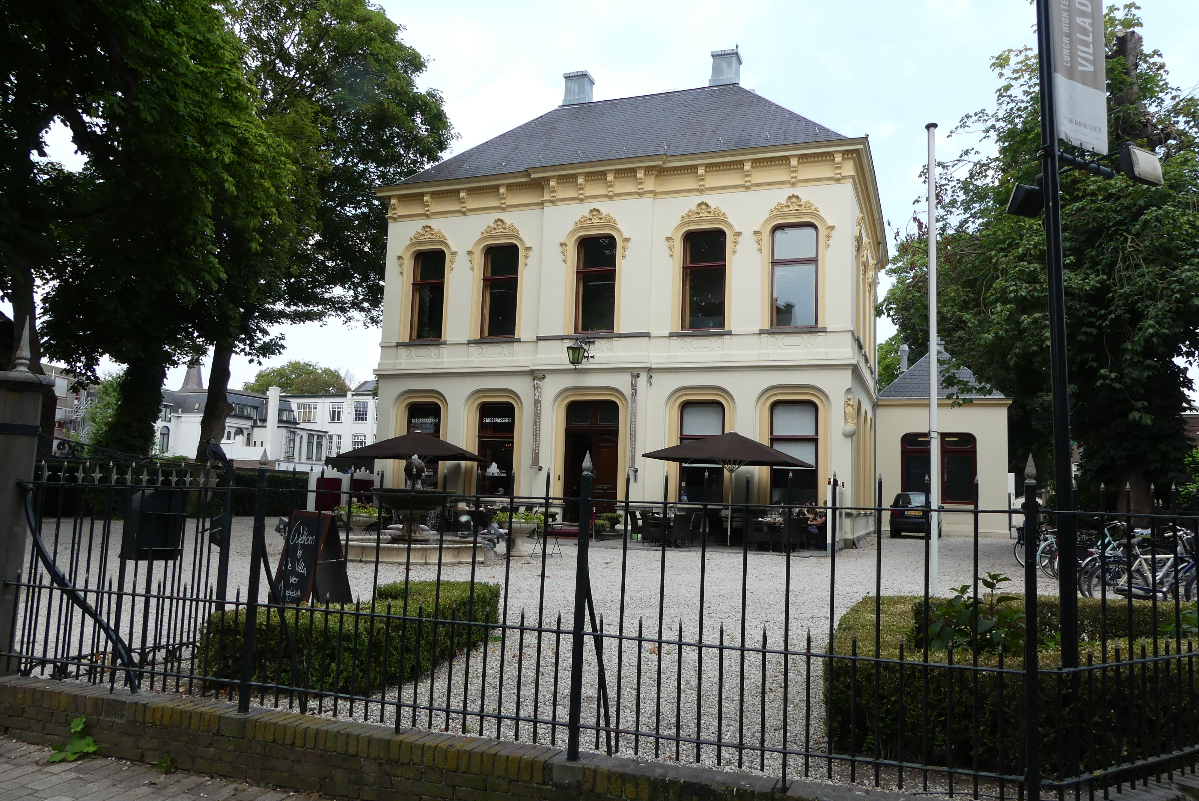 Zicht op de buitenkant van Villa De Vier Jaargetijden (Tilburg) gelegen in de Noordstraat 38 niet ver van het Centraal Station Tilburg en het centrum van Tilburg